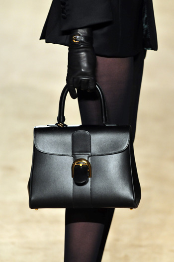 defilé de Veronique Branquinho